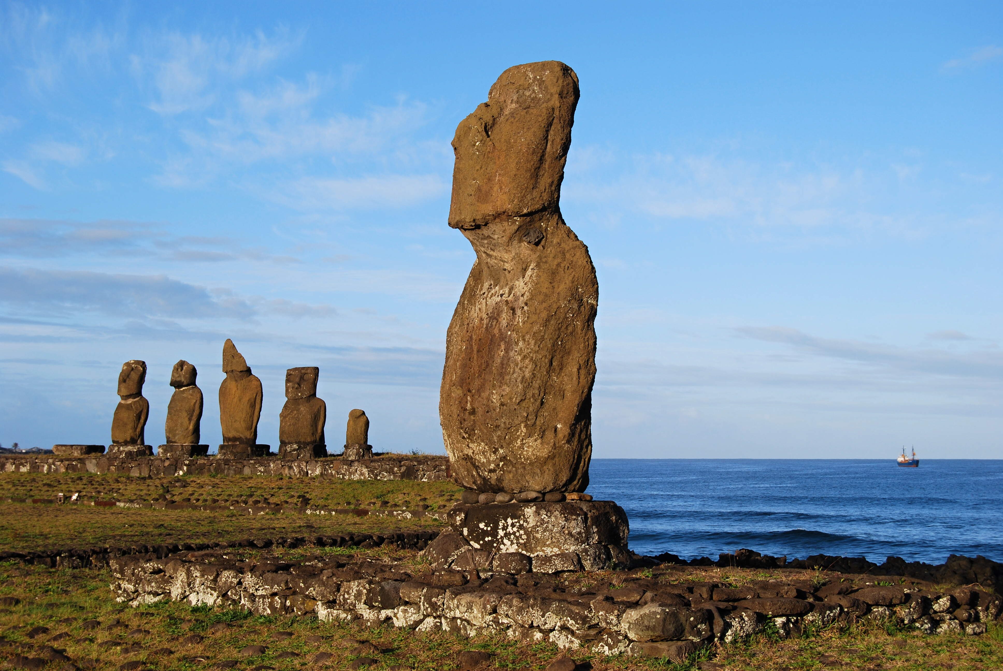 Sochy na Velikonočním ostrově - Tahai, v popředí Ahu Tahai, v pozadí Ahu Vai Uri